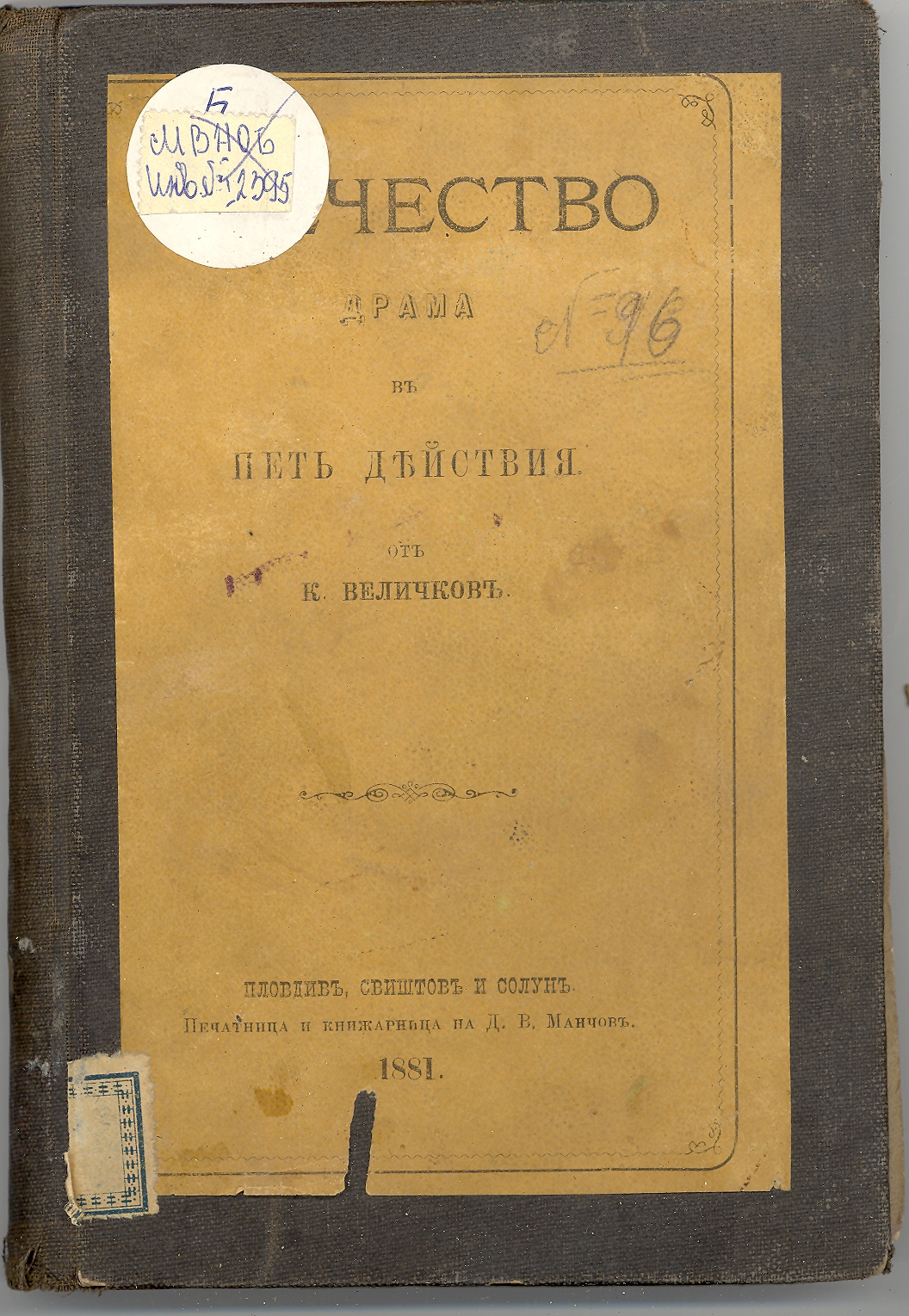 Корица на "Отечество" на Константин Величков.